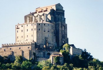 Sacra San Michele - Immagine di prorpietà di chi scrive (Fotogian) concessa sotto GFDL